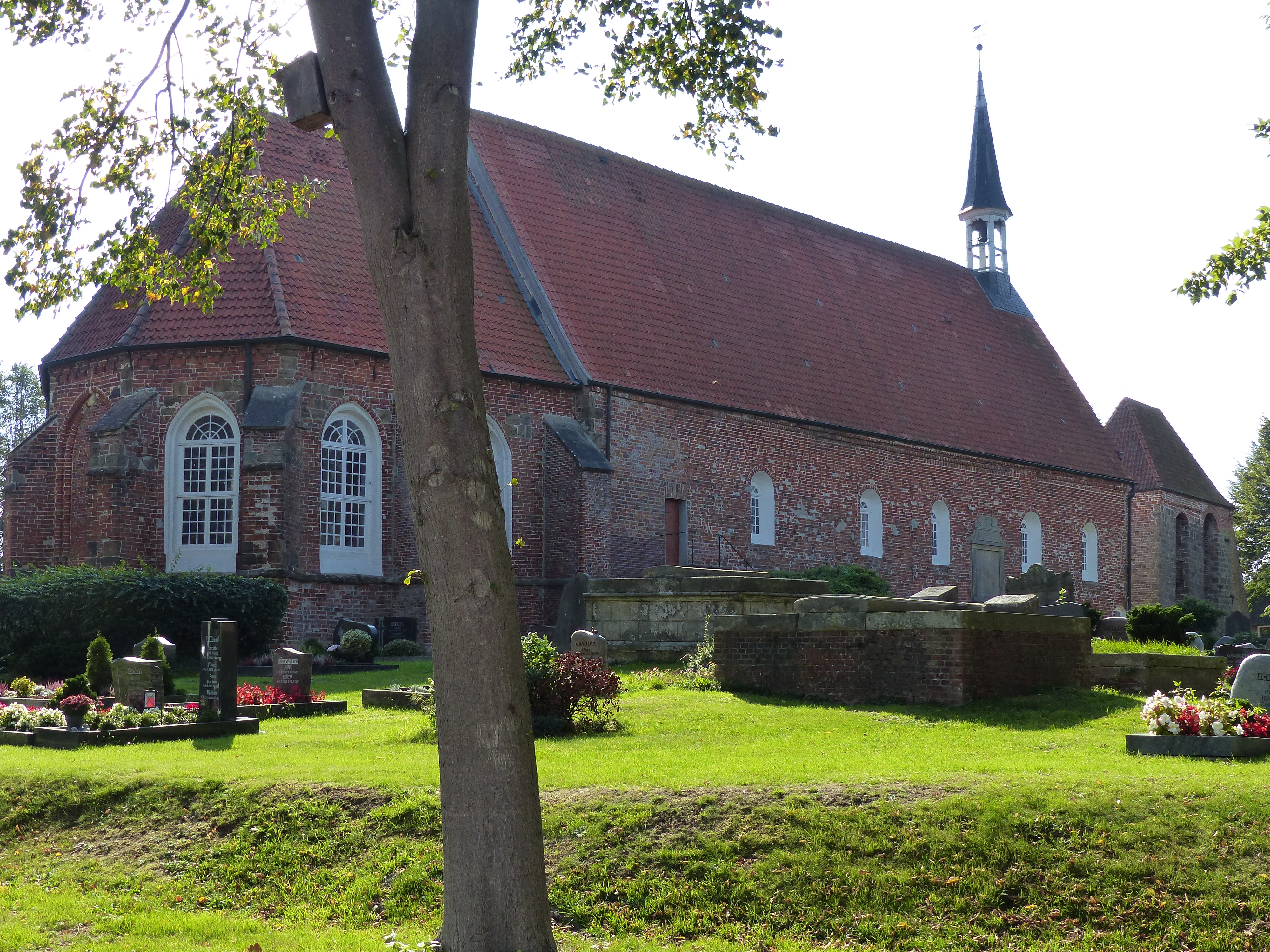 Dorfkirche Golzwarden von Nordosten